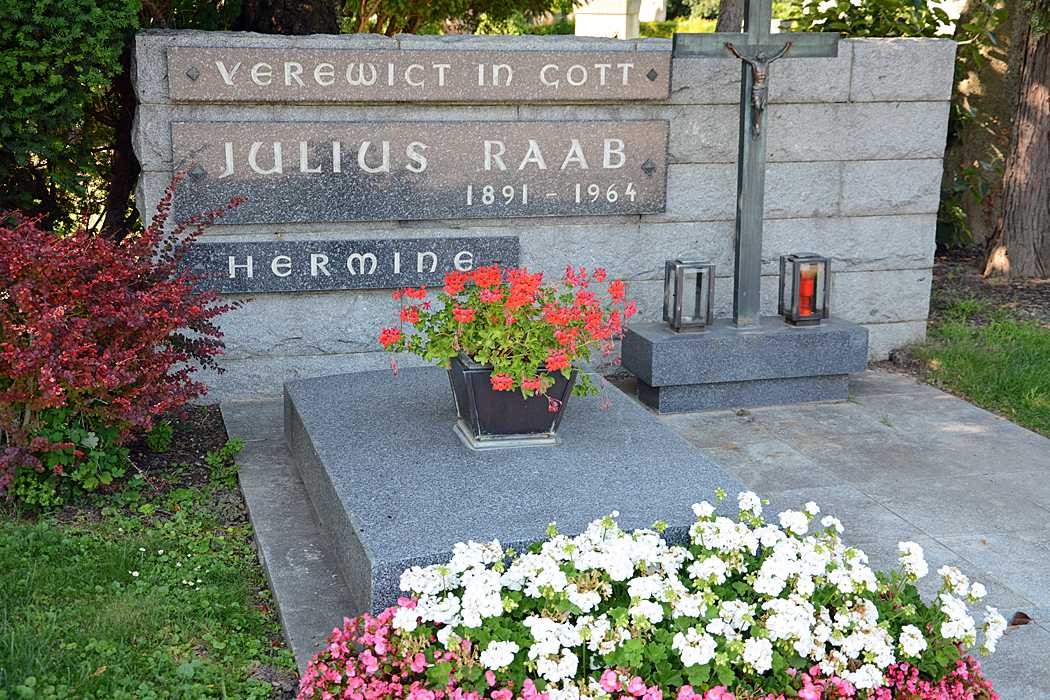 Grab von Julius Raab auf dem Zentralfriedhof Wien